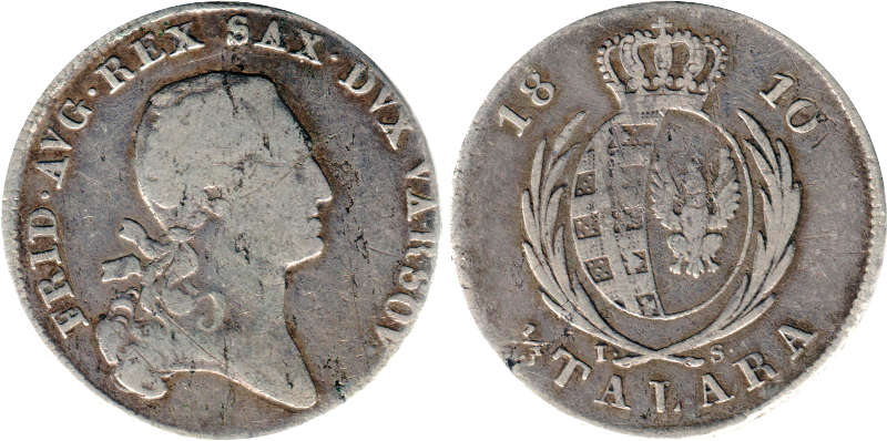 Jedna trzecia talara 1810